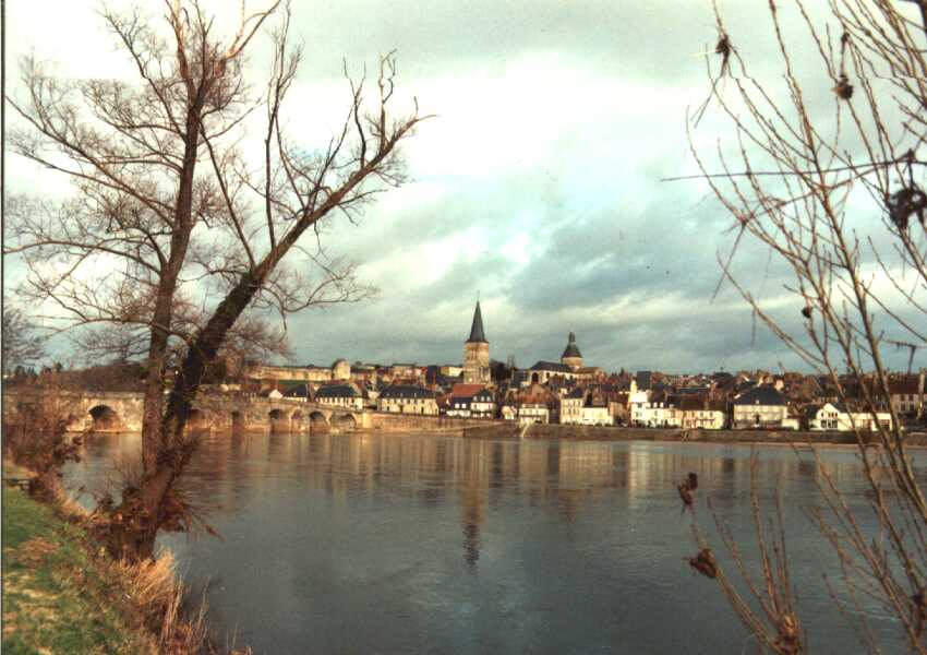 La Charité sur Loire, Nièvre (58), France